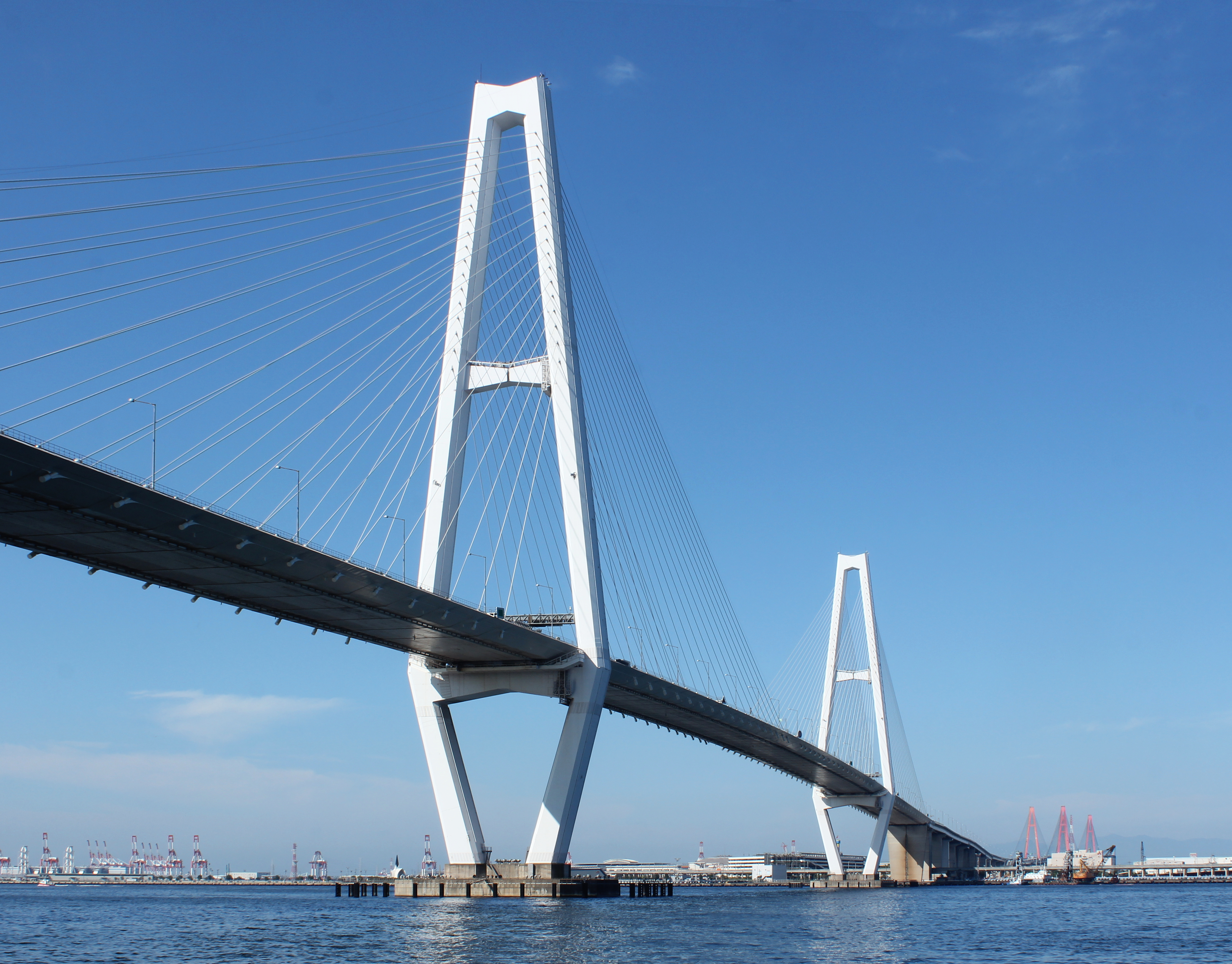 名港中央大橋と名港西大橋（奥）。潮見ふ頭から撮影。